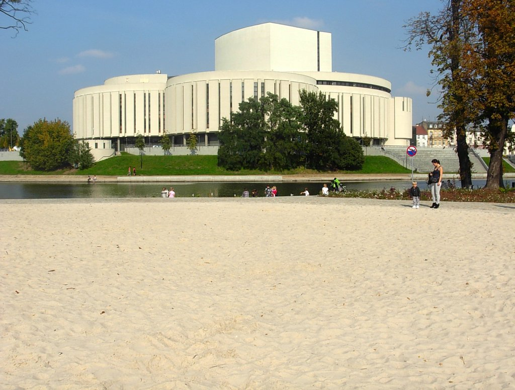 Plaża na Wyspie Młyńskiej w Bydgoszczy